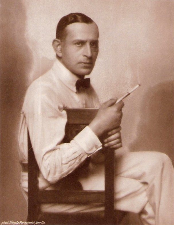 Max Landa